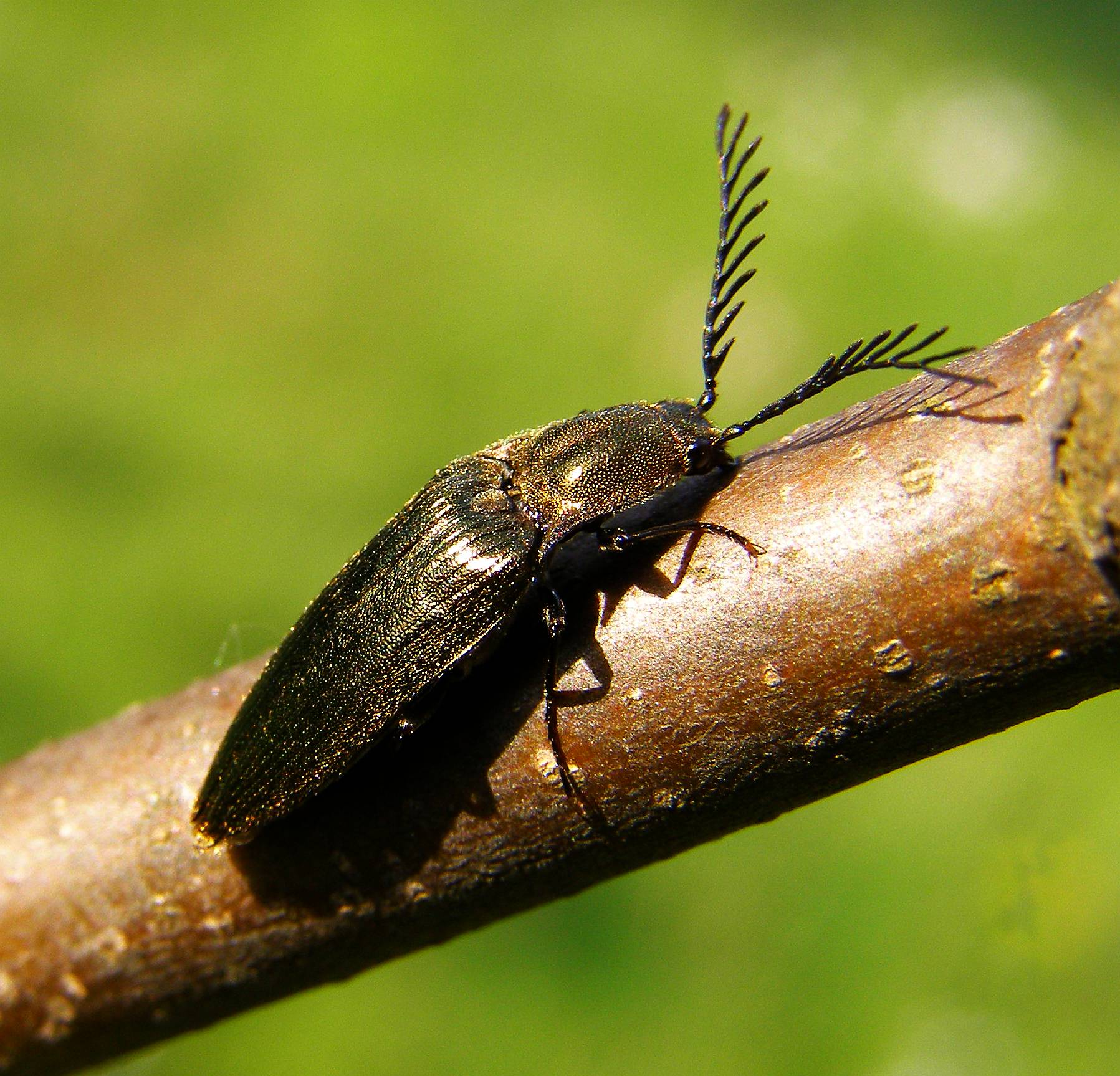 Rindenschnellkaefer (Ctenicera pectinicornis) braun-metallisch